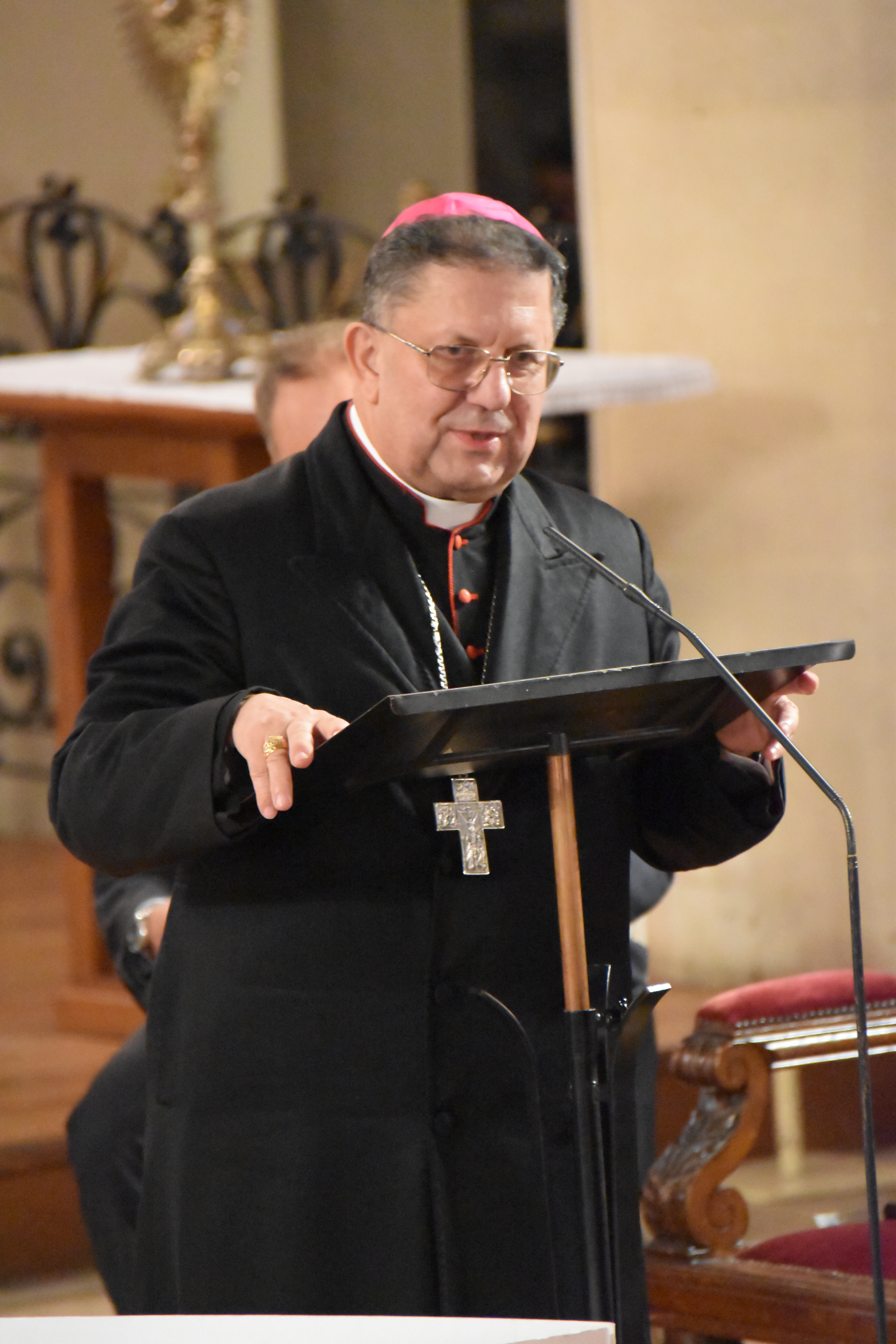 Mgr Jean-Benjamin Sleiman, lors de la 7e nuit des Témoins